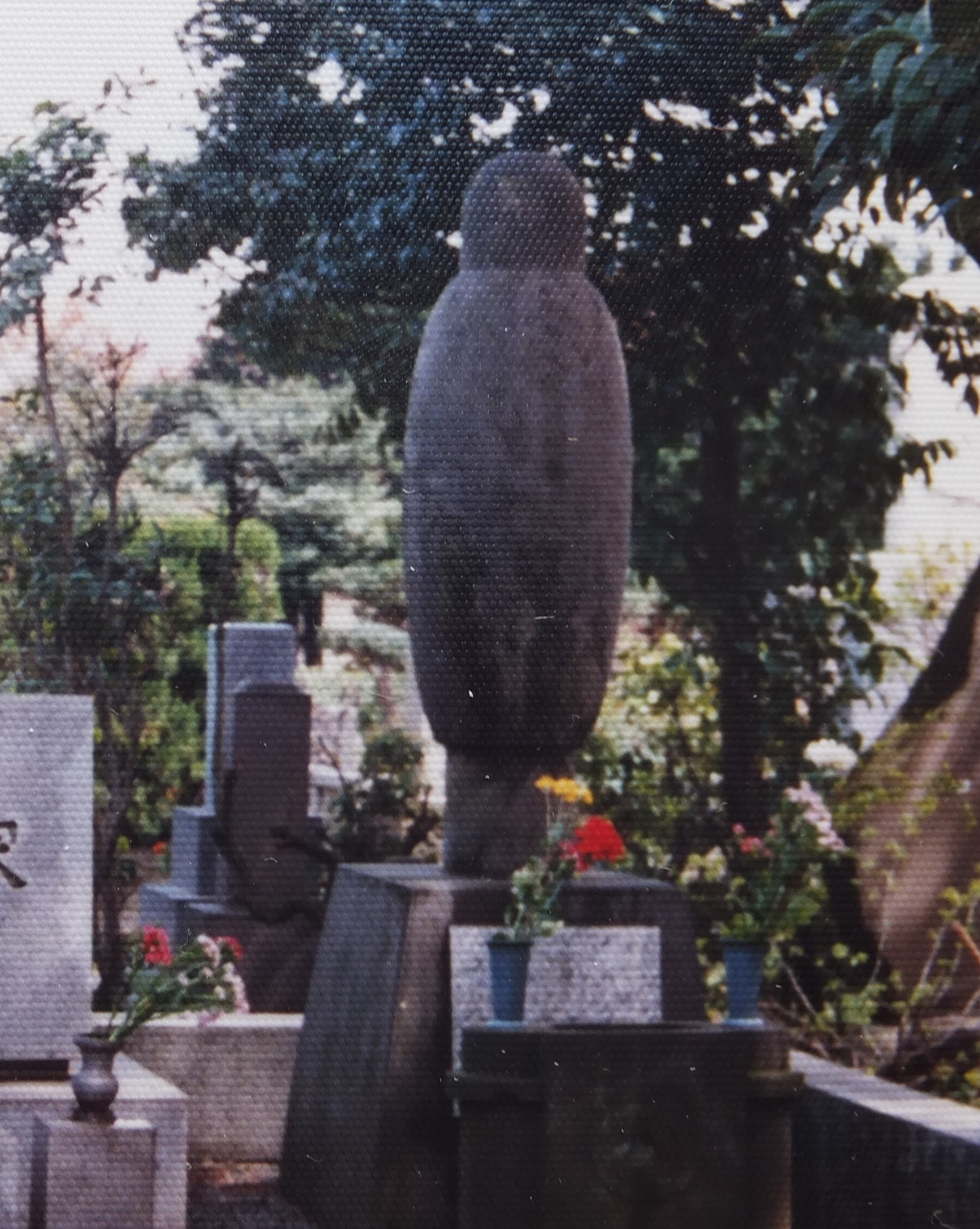 青山霊園墓所